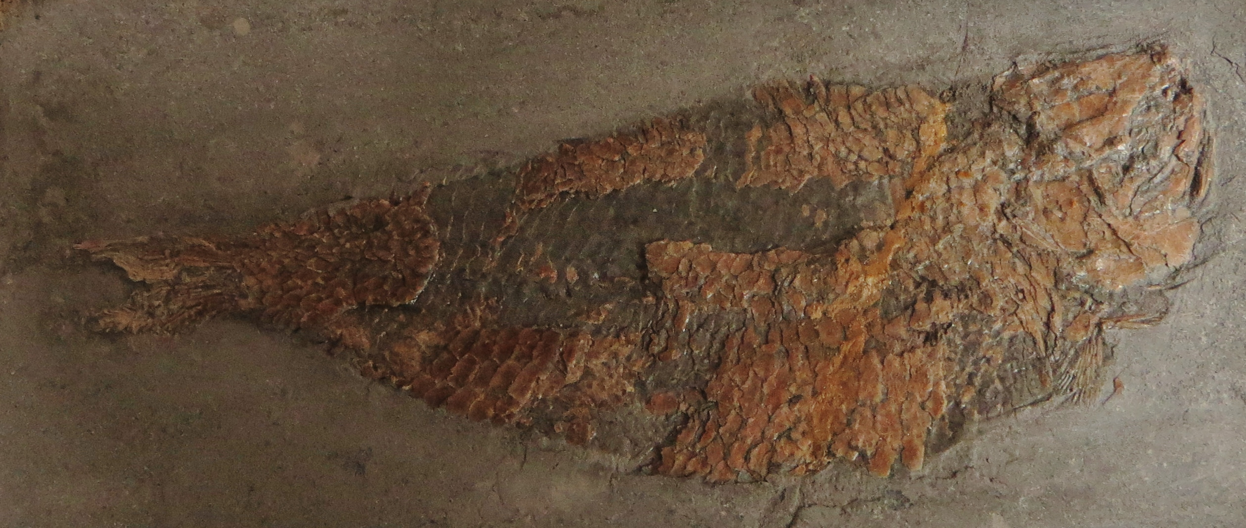 Fossil- Took the picture at Teylers Museum, Haarlem